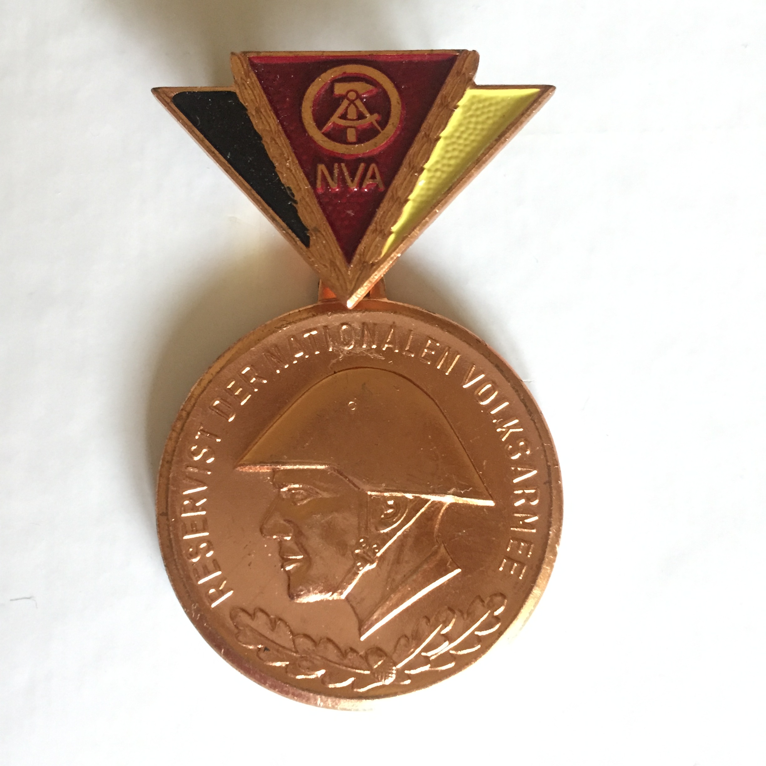 Medaille Reservist NVA